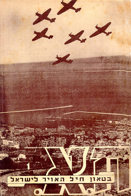 השער הראשון של ביטאון חיל האוויר מיום 20.9.1948.